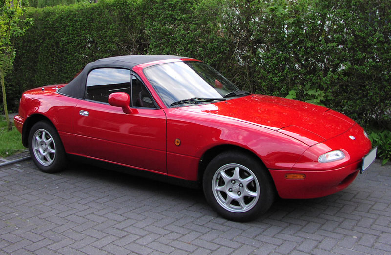 Mazda MX-5 Typ NA (Europa), Baujahr 1994, ABS, Fahrer-Airbag, Klappscheinwerfer